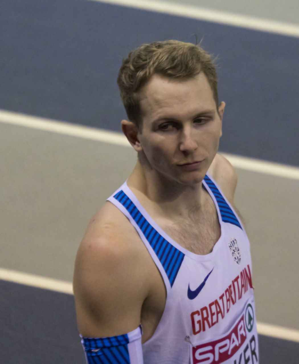 EKI10289 baker kwal hoog